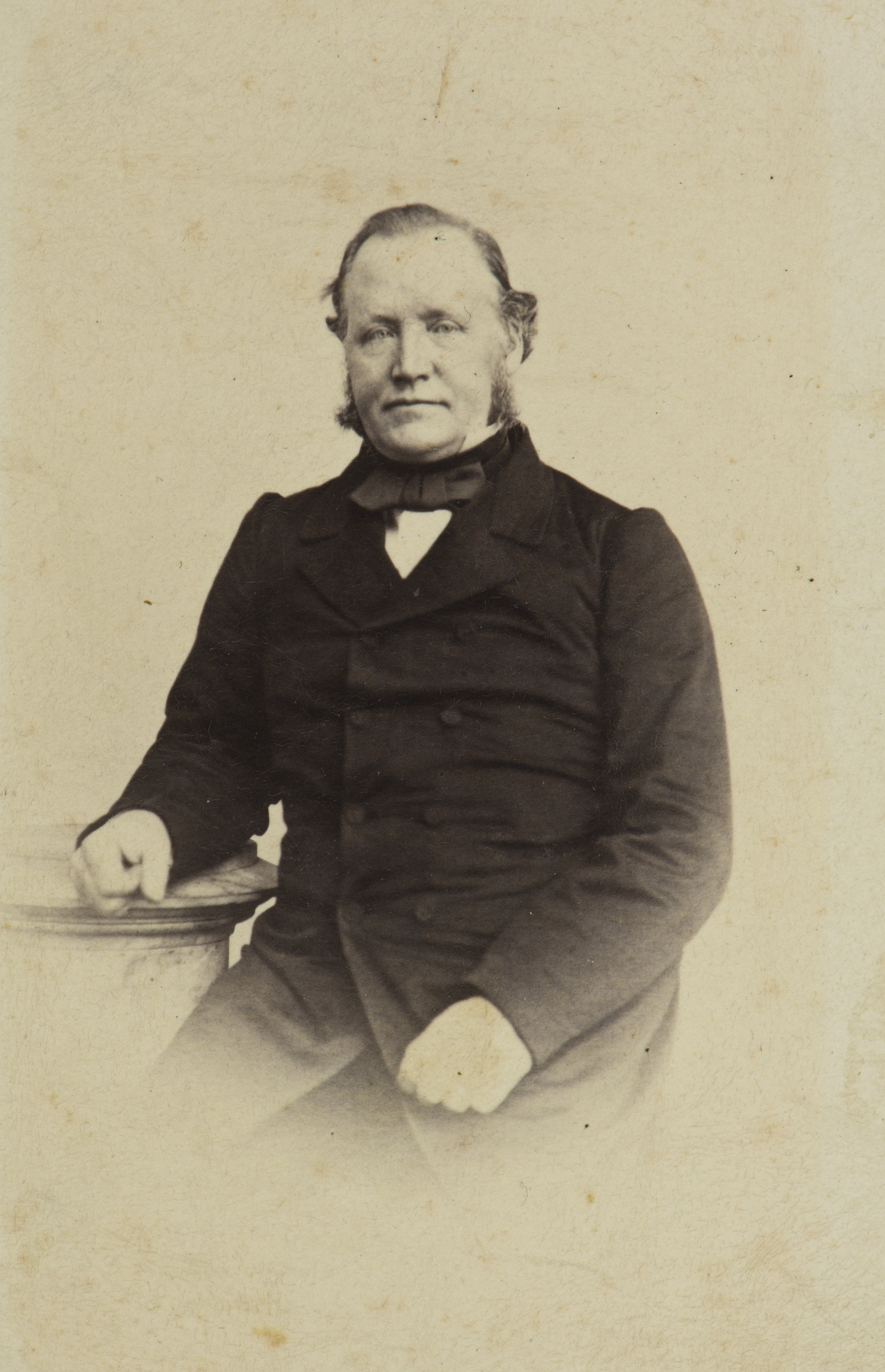 Hans Jenssen (1817–1888), kjøpmann i firmaet H. & T. Jenssen Trondheim.